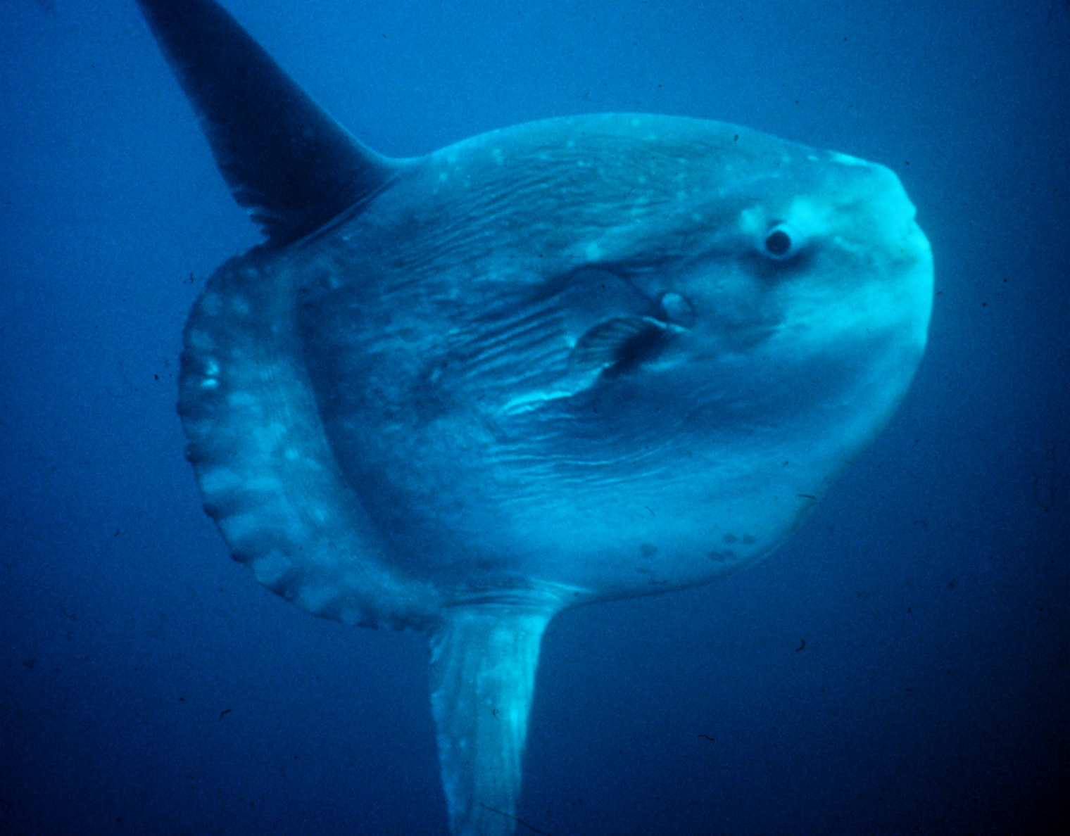 Mola mola (en: Ocean Sunfish; pt: Peixe lua)